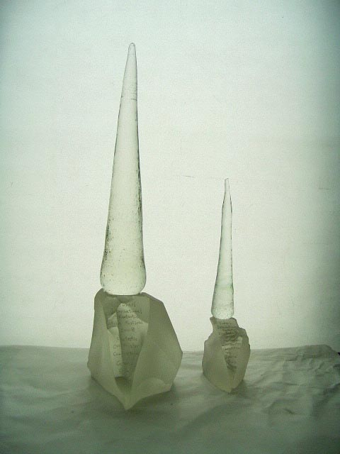 2008年から授与されるトロフィー